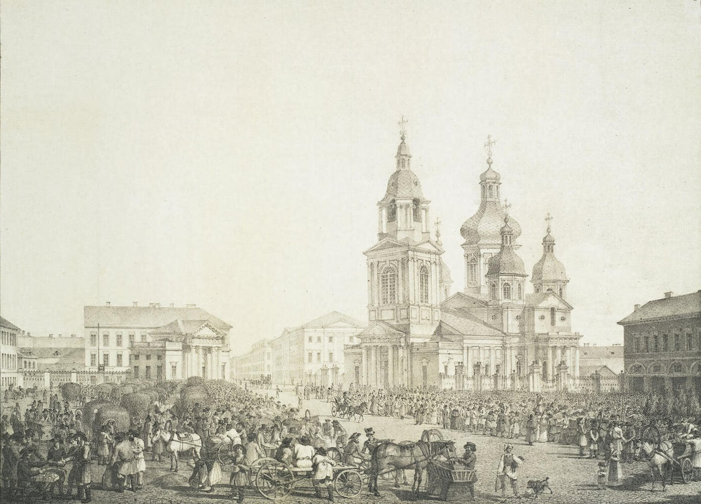 Сенная площадь. Литография. Отпечатано в лит. П.Ф. Гельмерсена. Государственный Эрмитаж